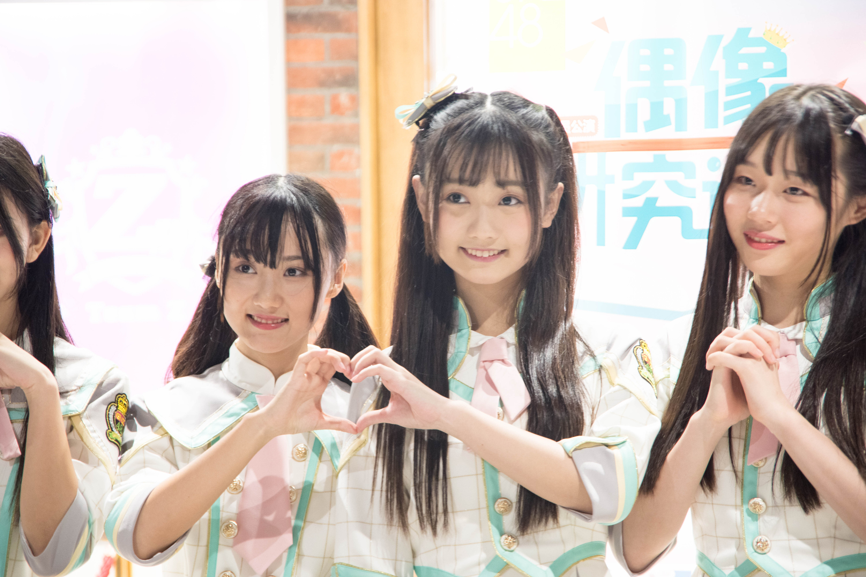 20171001——三期出道（何梦瑶、梁婉琳）